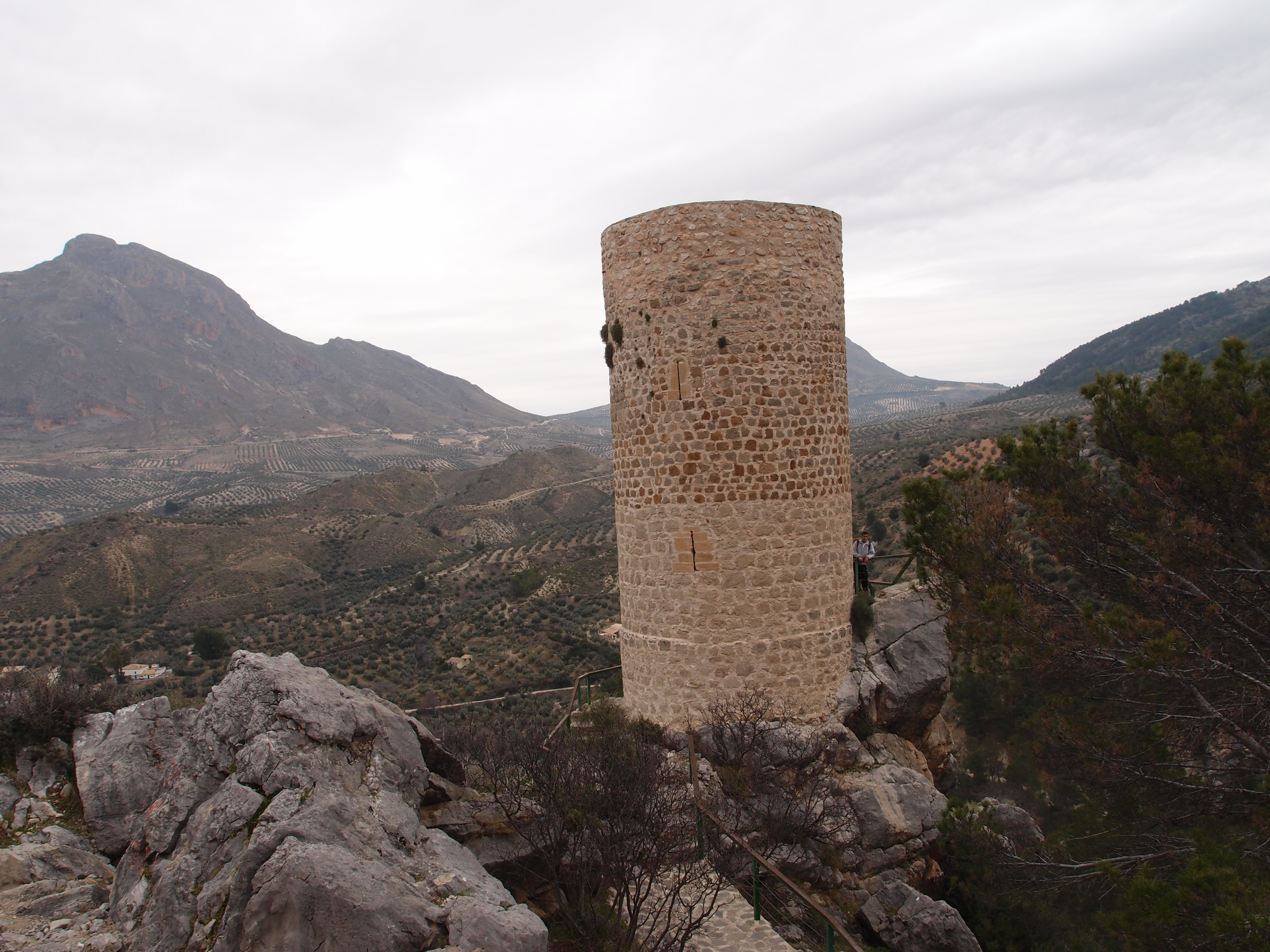 Vista de la torre de Cuadros, Bien de Interés Cultural.